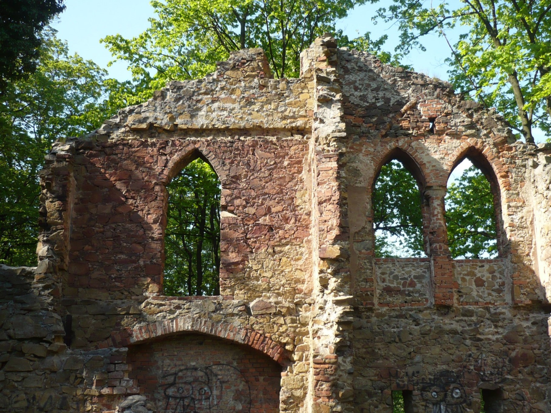 Stary Ksiaz